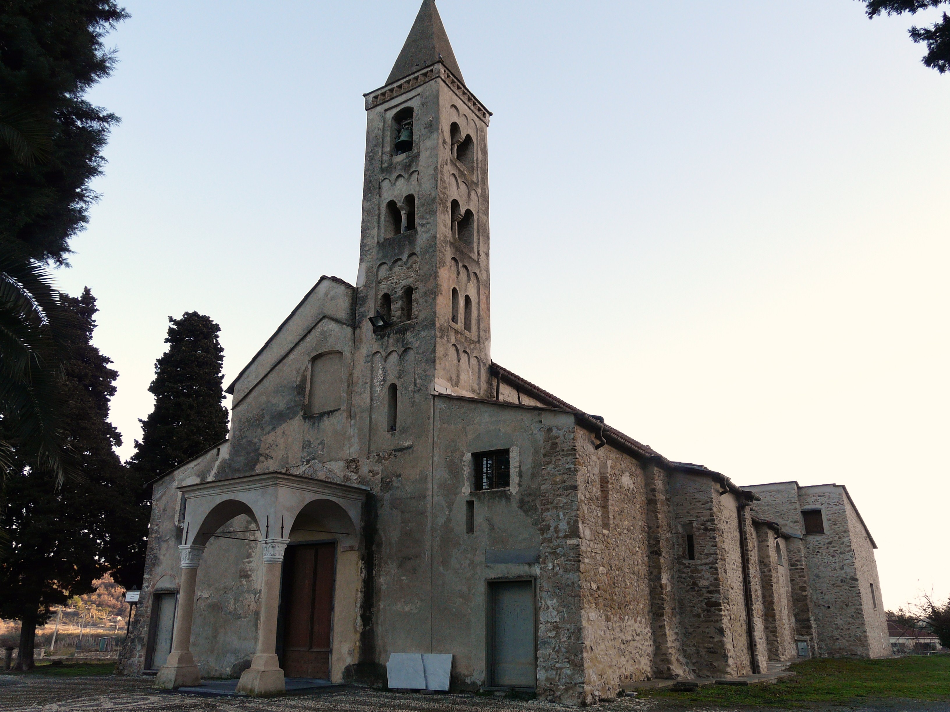 Chiesa di Santo Stefano di Cavatorio, Villanova d'Albenga, Liguria, Italia